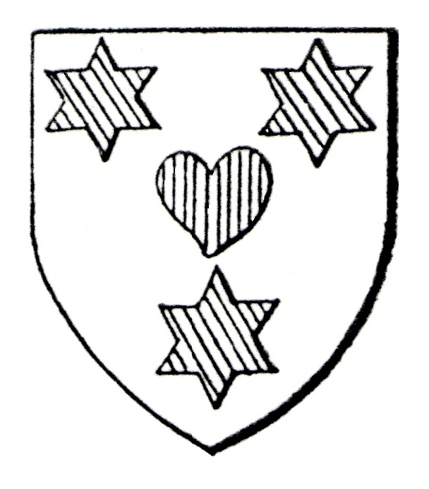 Blason de la famille de Becker